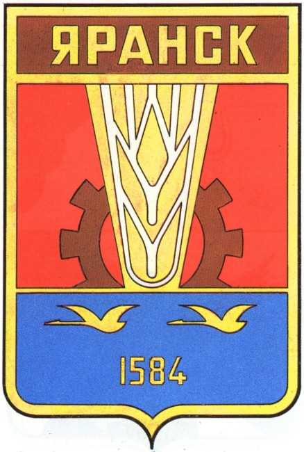 Герб города Яранска Кировской области 1971 года